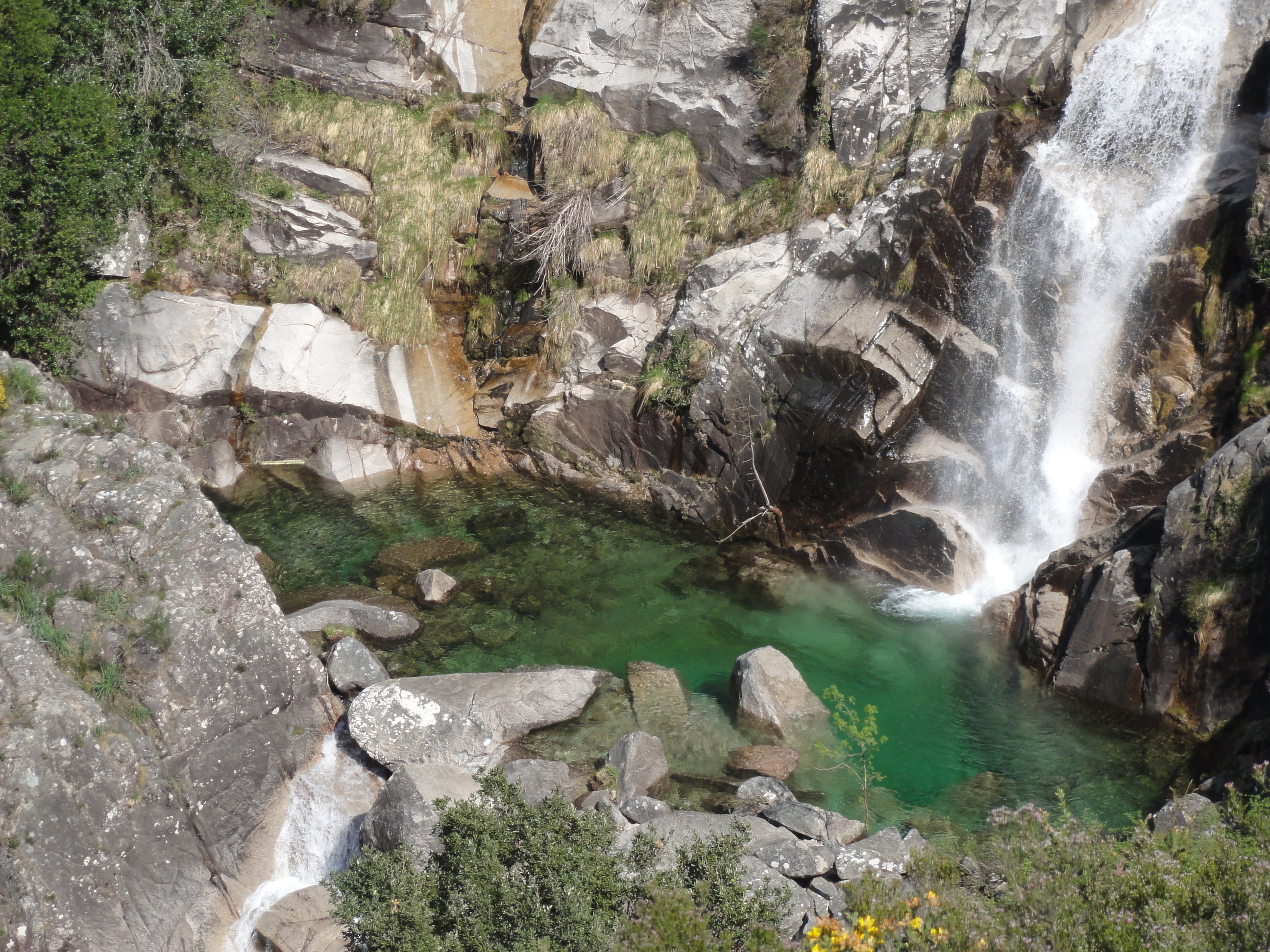 Corga da Fecha This is a photography of a Site of Community Importance in Spain with the ID: ES1130001. Natura2000 entry, EEA entry